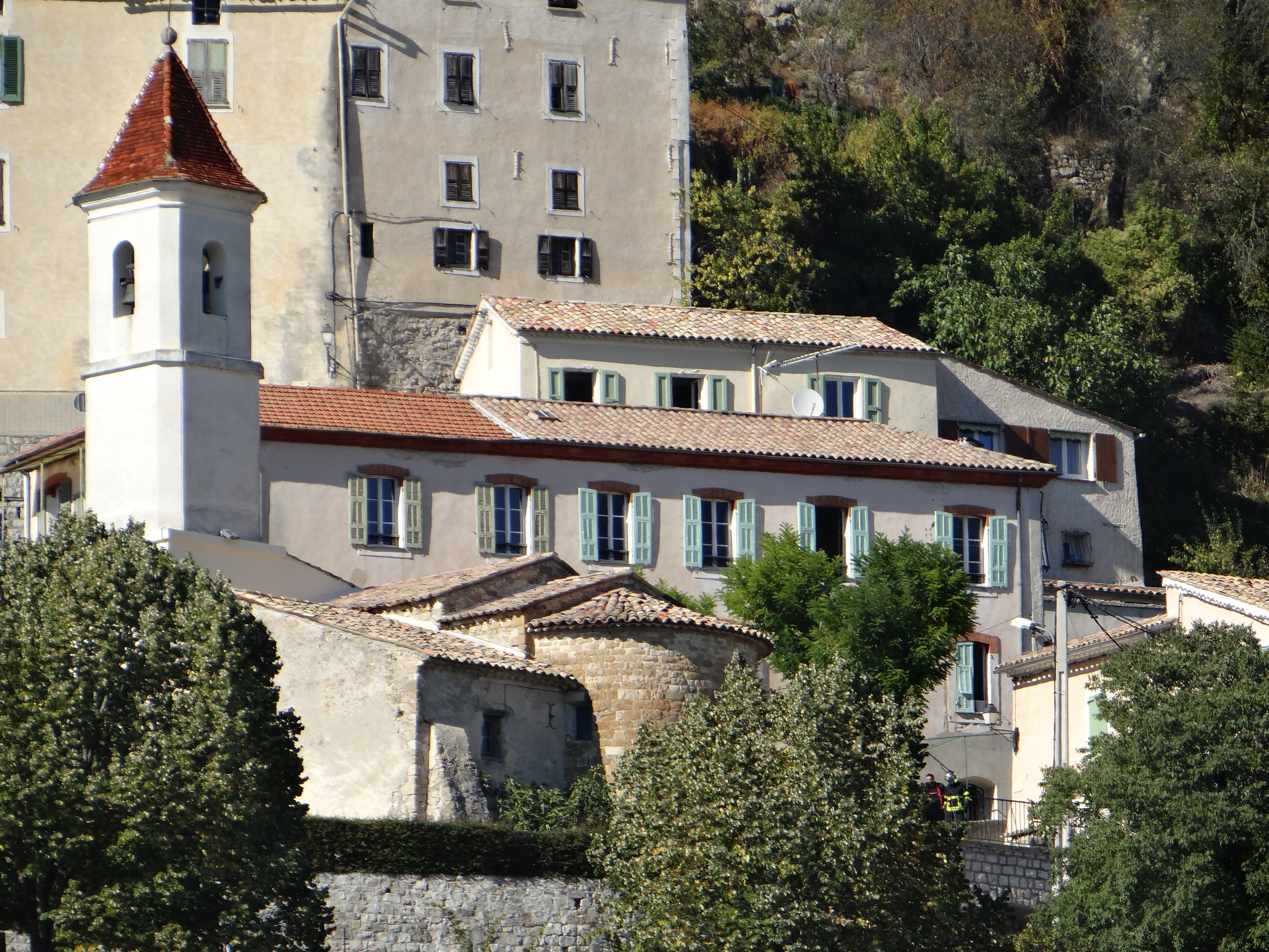 La Penne - Eglise Saint-Pierre